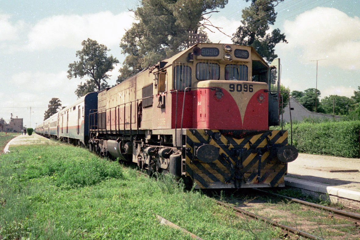 Tren Serranoche de Ferrocarriles Argentinos detenido en estacion Rio Segundo, provincia de Cordoba. Este tren hacía el recorrido Retiro-Cordoba. Año 1990.